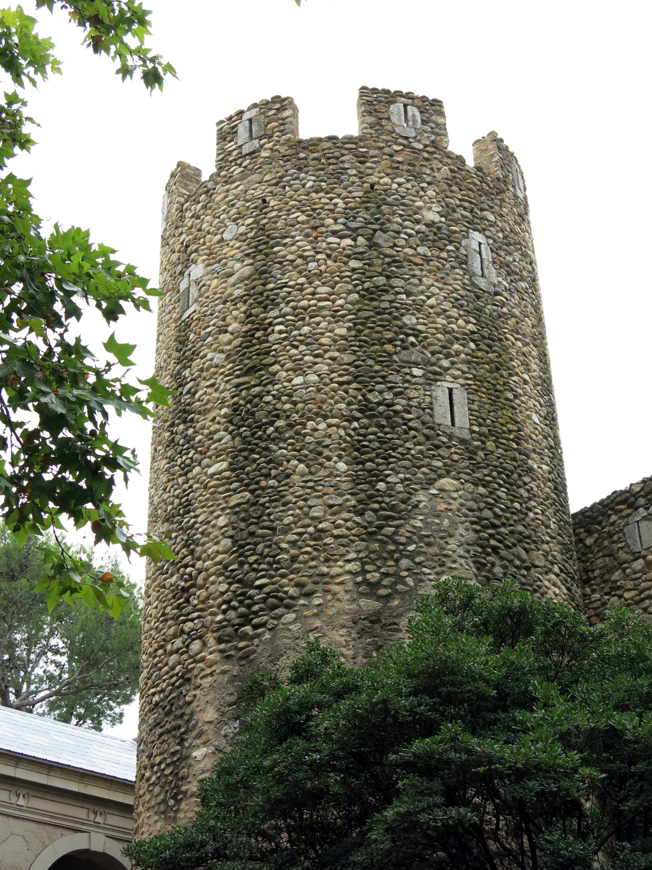 Restes de muralles (Peralada)